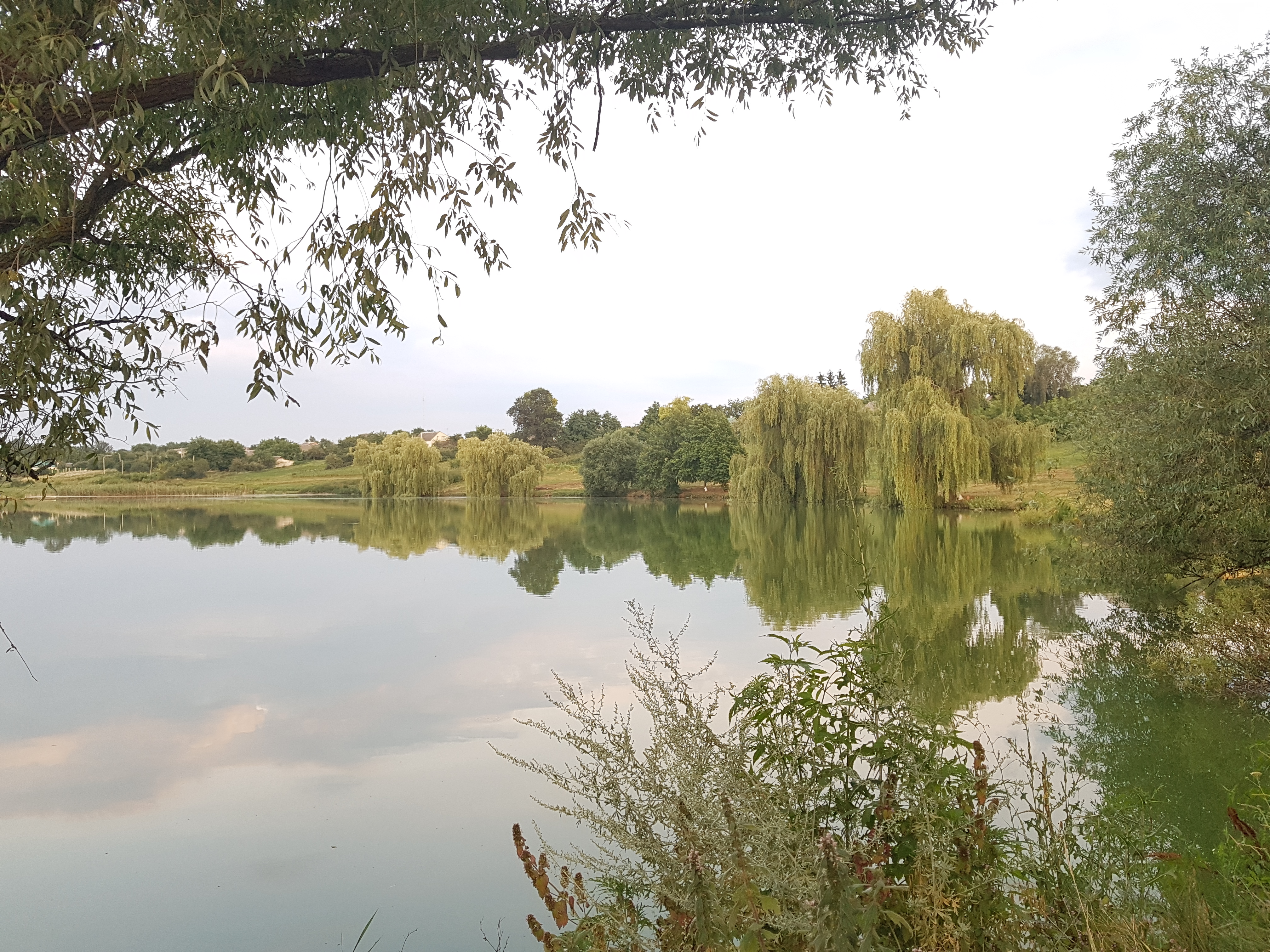 Штучна водойма в Івонченцях